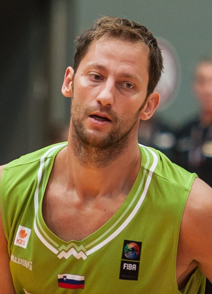 ÖBV Vier-Nationen-Turnier vom 12.-14. August 2016 in Schwechat: Österreich vs Slowenien. Bild zeigt Sasa Zagorac (SLO) und Davor Lamesic (AUT).